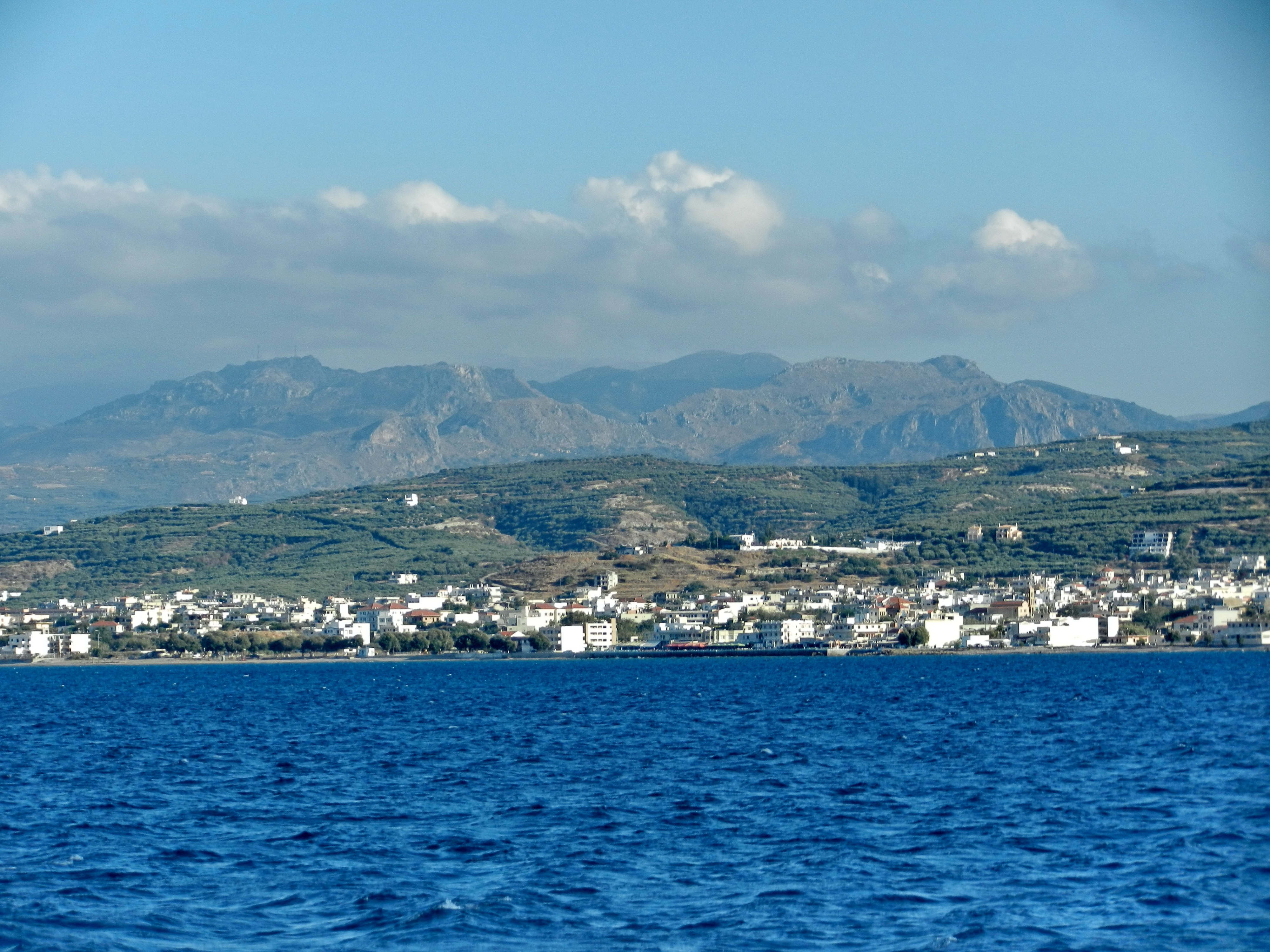 Kissamos Crete